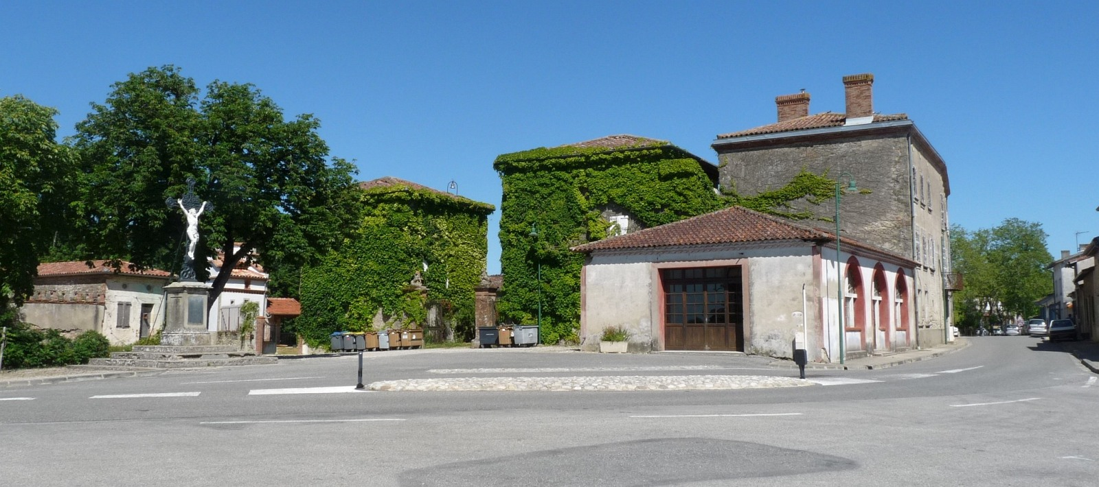 Place principale. Le Faget, Haute-Garonne, France